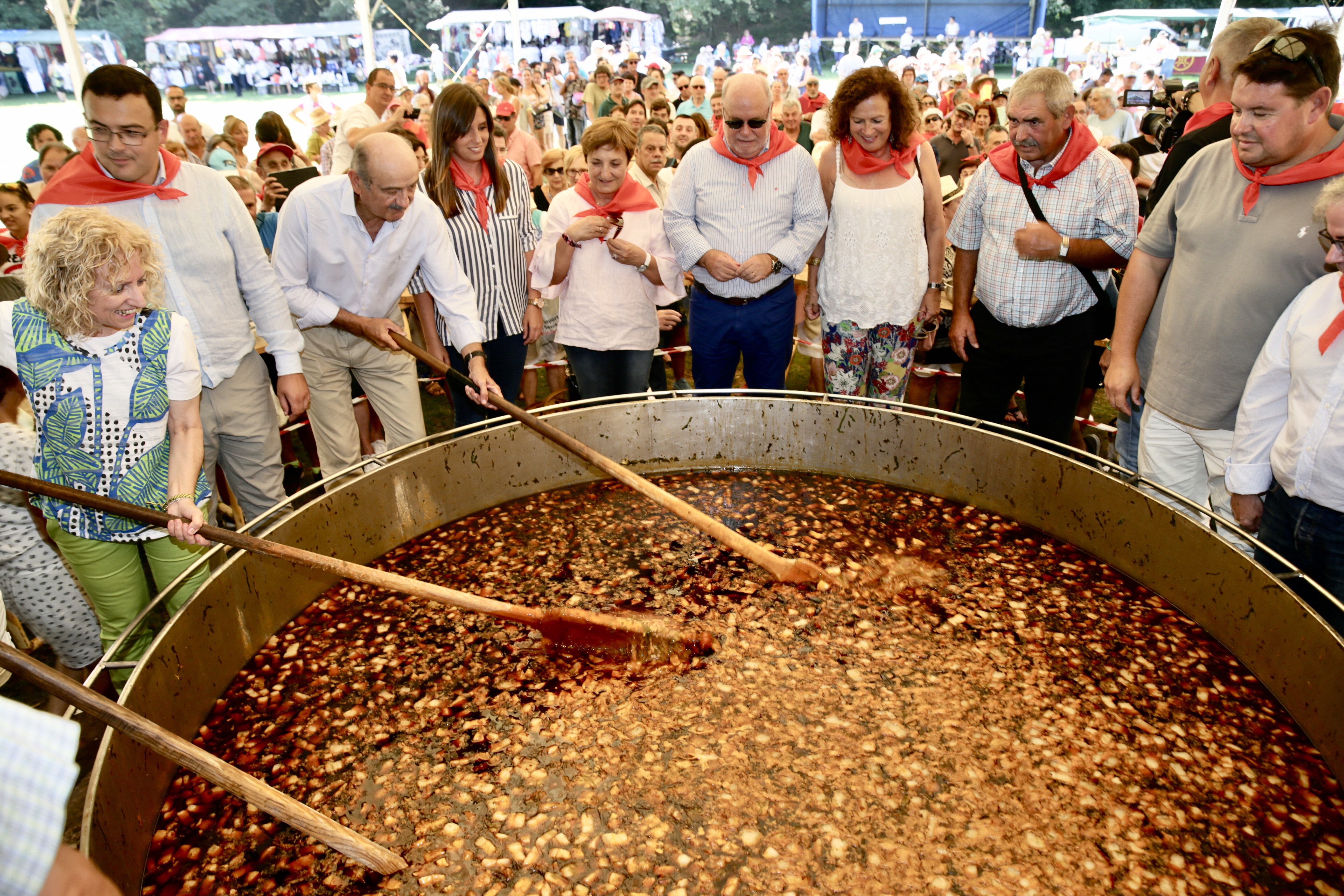 Declarada de Interés Turístico Regional, es una de las citas más populares de la región, que cada año atrae a miles de visitantes y vecinos a la tradicional campa